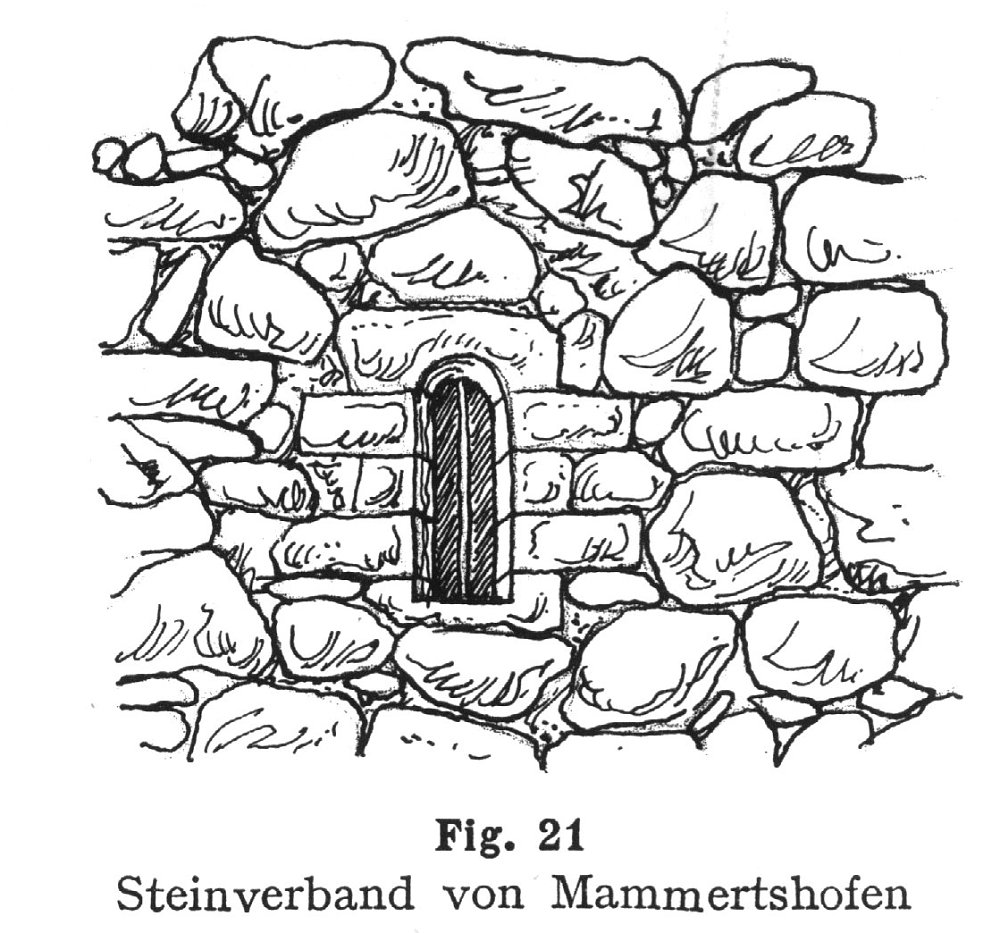 Steinverband von Mammertshofen